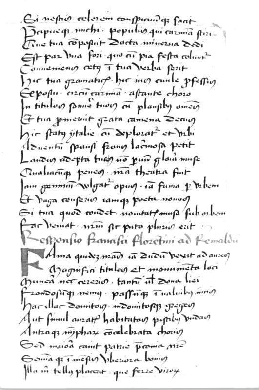 Handschrift, Francesco Petrarca ADN-ZB Ludwig-19.8.85-se-Bez. Erfurt-Literarische Entdeckung In einer Handschrift des 15. Jahrhunderts, die zu den Schätzen der Forschungsbibliothek Gotha gehört, wurde jetzt ein verschollenes Gedicht des italienischen Dichters und Humanisten Francesco Petrarca (1304 - 1374) entdeckt. Bisher waren nur 2 Verse bekannt, die Petrarca in seiner Rede anläßlich seiner Krönung zum Dichter am 8. April 1341 auf dem Kapitol in Rom zitiert hatte. Die Papierhandschrift aus dem 15. Jahrhundert enthält das vollständige Gedicht mit 142 Versen. Diese Entdeckung machte der italienische Wissenschaftler Prof. Dr. Michele Feo. (s. auch 16 - 18N)